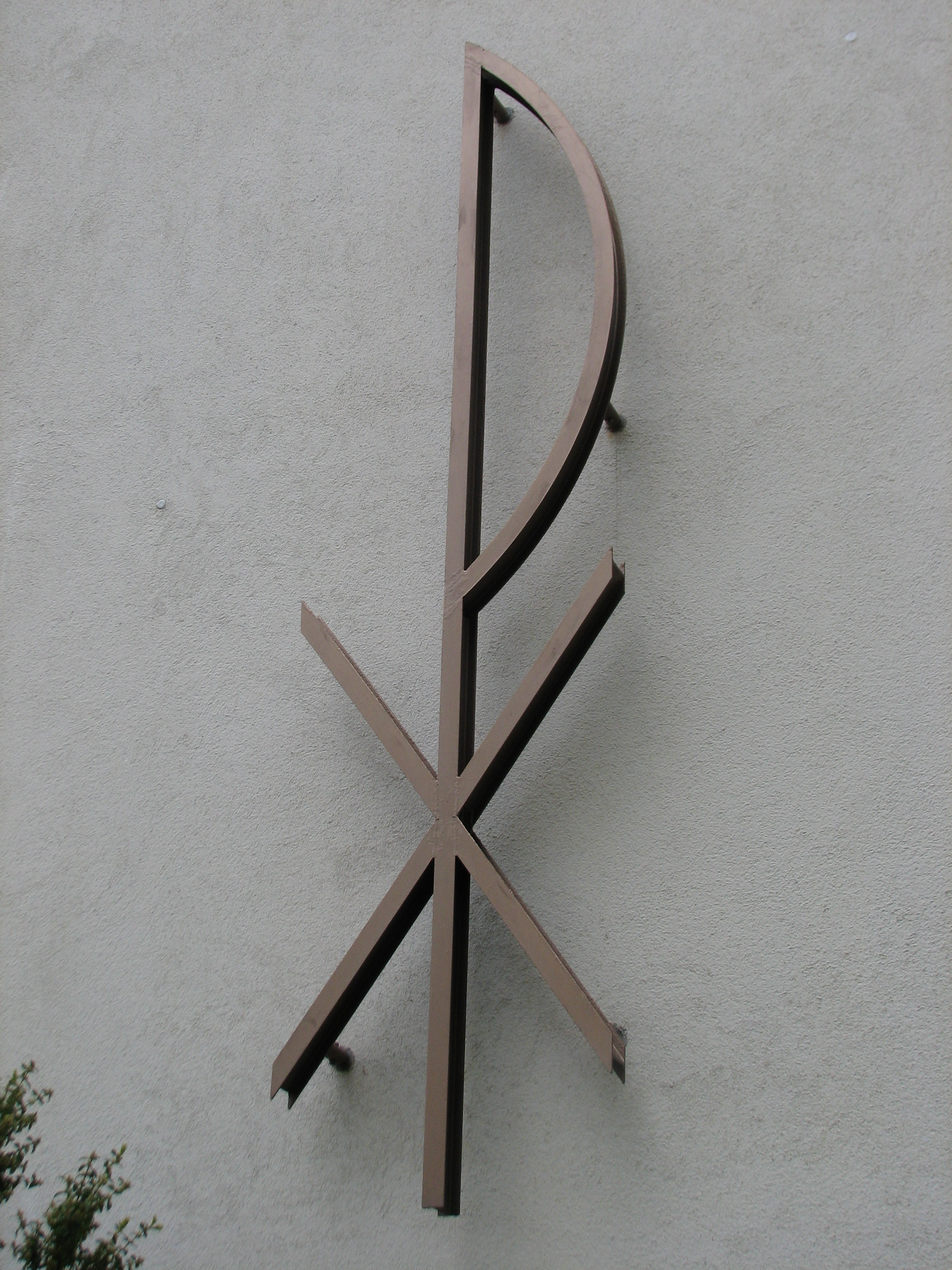 Christliches Symbol an der Frontfassade der Kirche Borsdorf